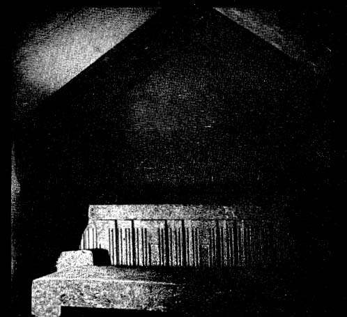 Sarcophage de la pyramide de Sésostris II à ILLAHOUN